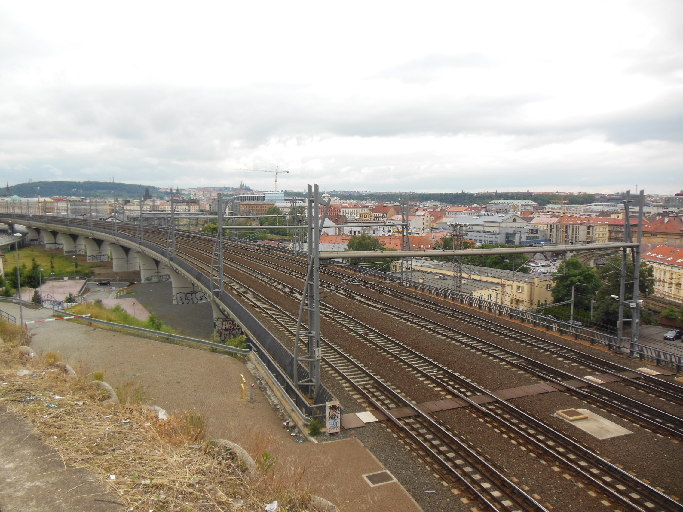 Viadukt Nového spojení v Praze.